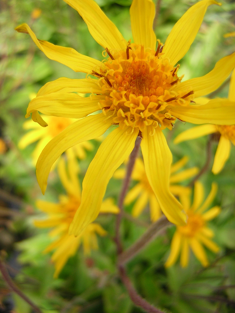 (en) Arnica montana field in Scotland (july 2004) (fr) exemple de culture de Arnica montana en Écosse (juillet 2004). Cette culture est située en Écosse, au nord d'Inverness à environ 150 m d'altitude. Cette culture d'Arnica montana fonctionne sous la forme d'une rotation culturale où pendant quatre années se récoltent quelques dizaines de kilogrammes de capitules secs sur chaque parcelles de 1000m². Cinq parcelles de cette taille ont ainsi un développement échelonné afin de permettre une production de plante entière annuelle d'environ 800 kg frais. Les plants sont cultivés sur des buttées de terre, recouvertes d'une bâche afin de limiter les adventices, avec un espacement d'environ 40 cm. Les plants de culture sont élancés et fins contrairement aux plants sauvages souvent trapus. Les capitules sont récoltés puis séchés, en laissant quelques fleurs pour la récolte des graines. Ces capitules récoltés sont destinés aux laboratoires pharmaceutiques, principalement Weleda.